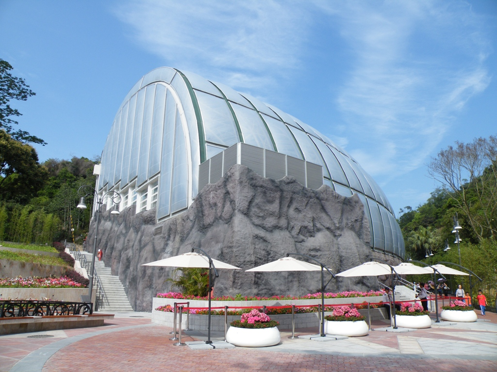 Macao Giant Panda Pavilion